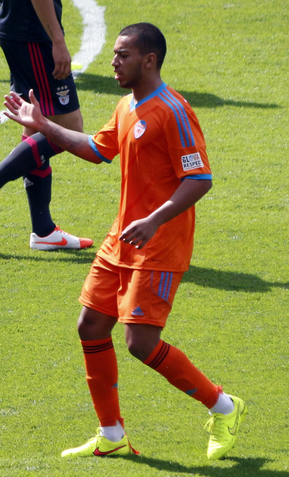 Emirates Cup, 3 d'agost de 2014.